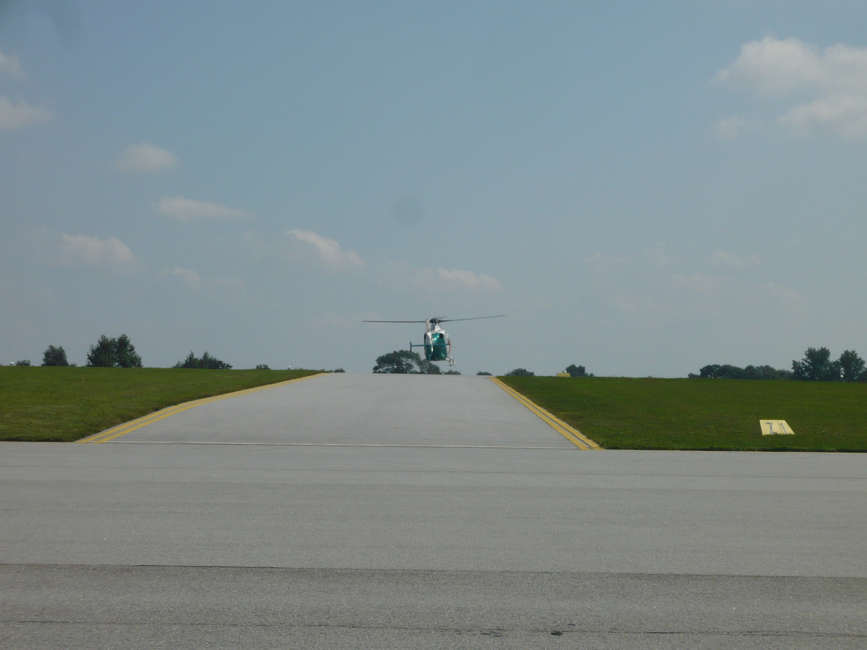 Helipad am Flughafen München Franz Josef Strauß